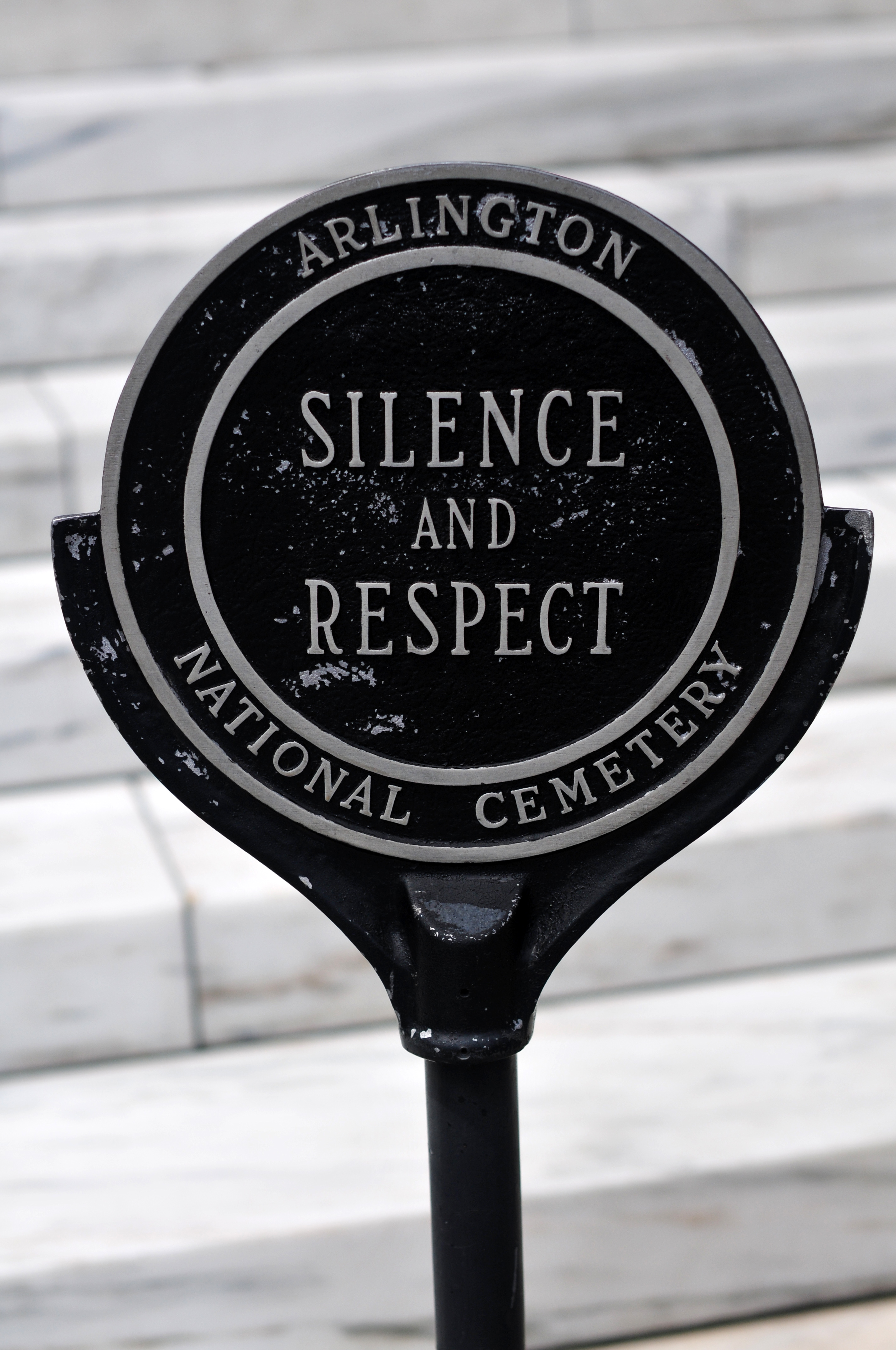 Friedhof Arlington